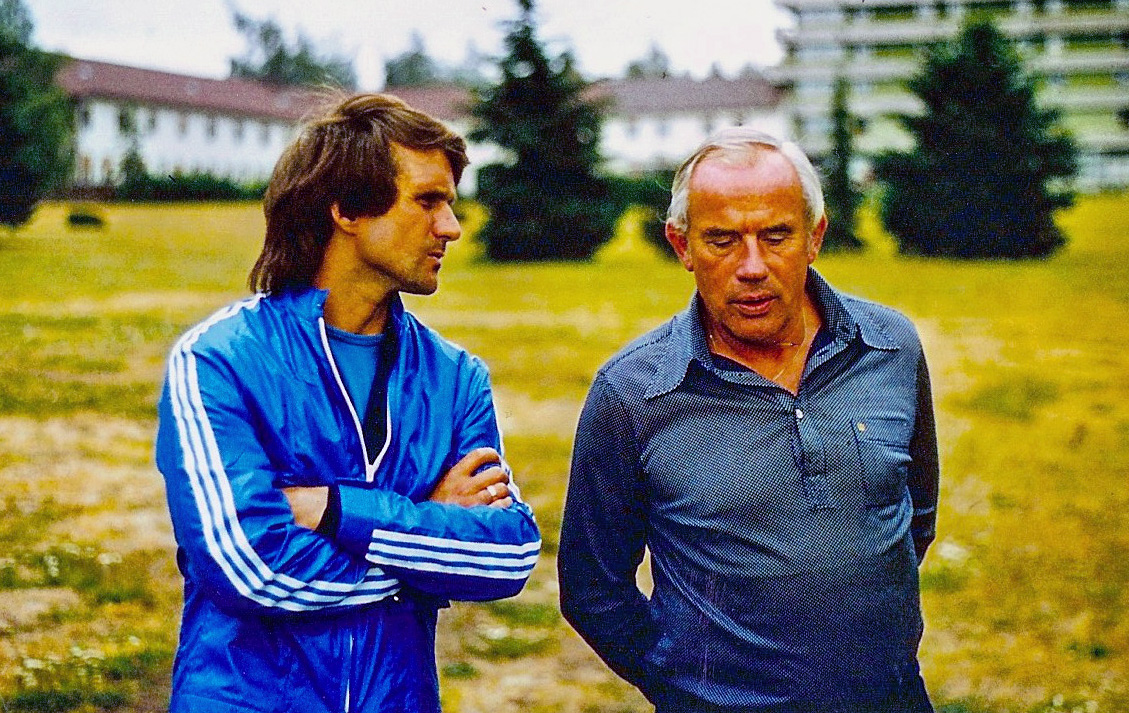 Wolfgang Overath and Hennes Weissweiler 1976 at Sportschule Grünberg Germany